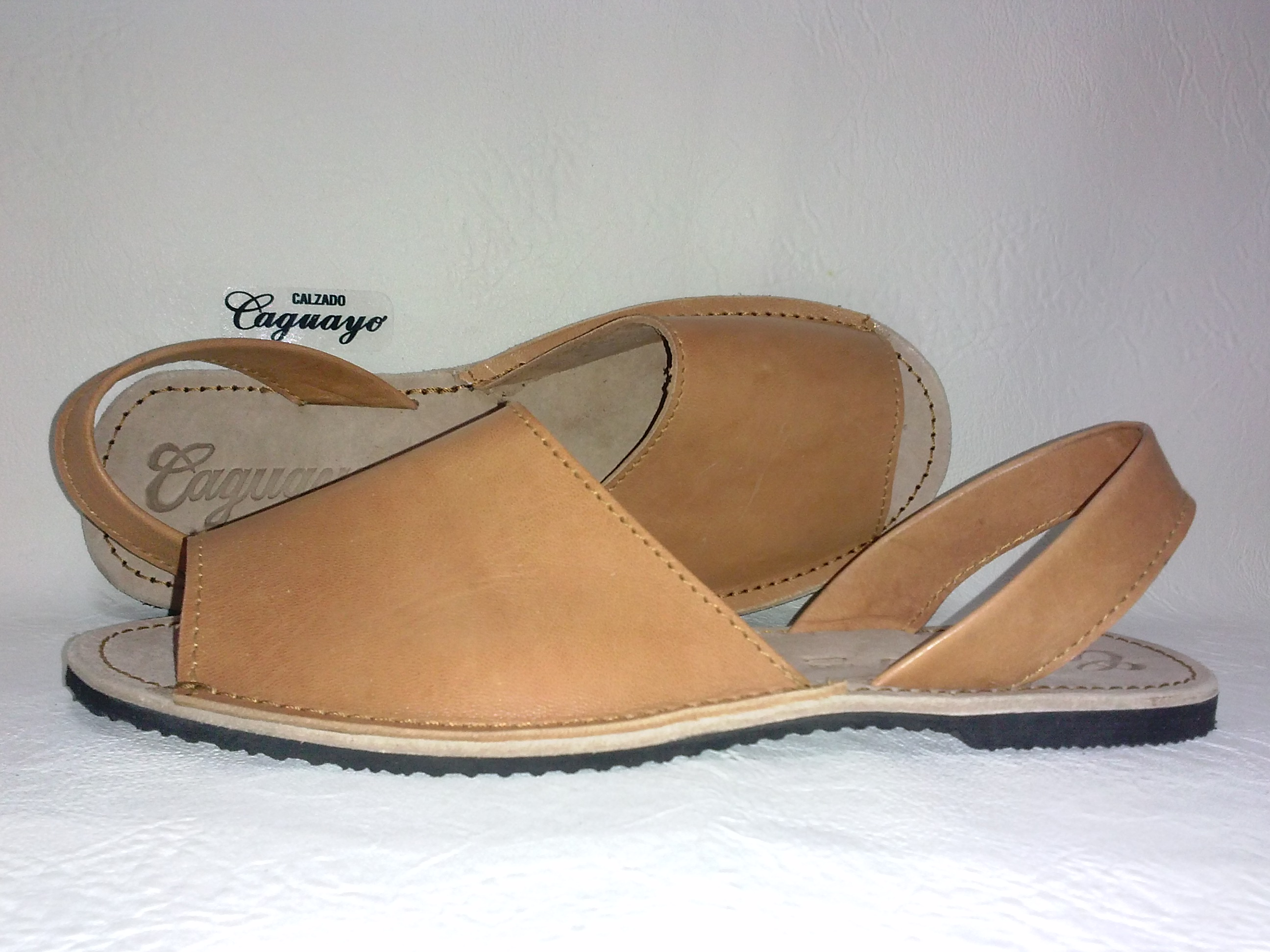 Abarca Cubana. Notese el largo de la pieza que cubre el empeine.(Fotografia:Caguayo)